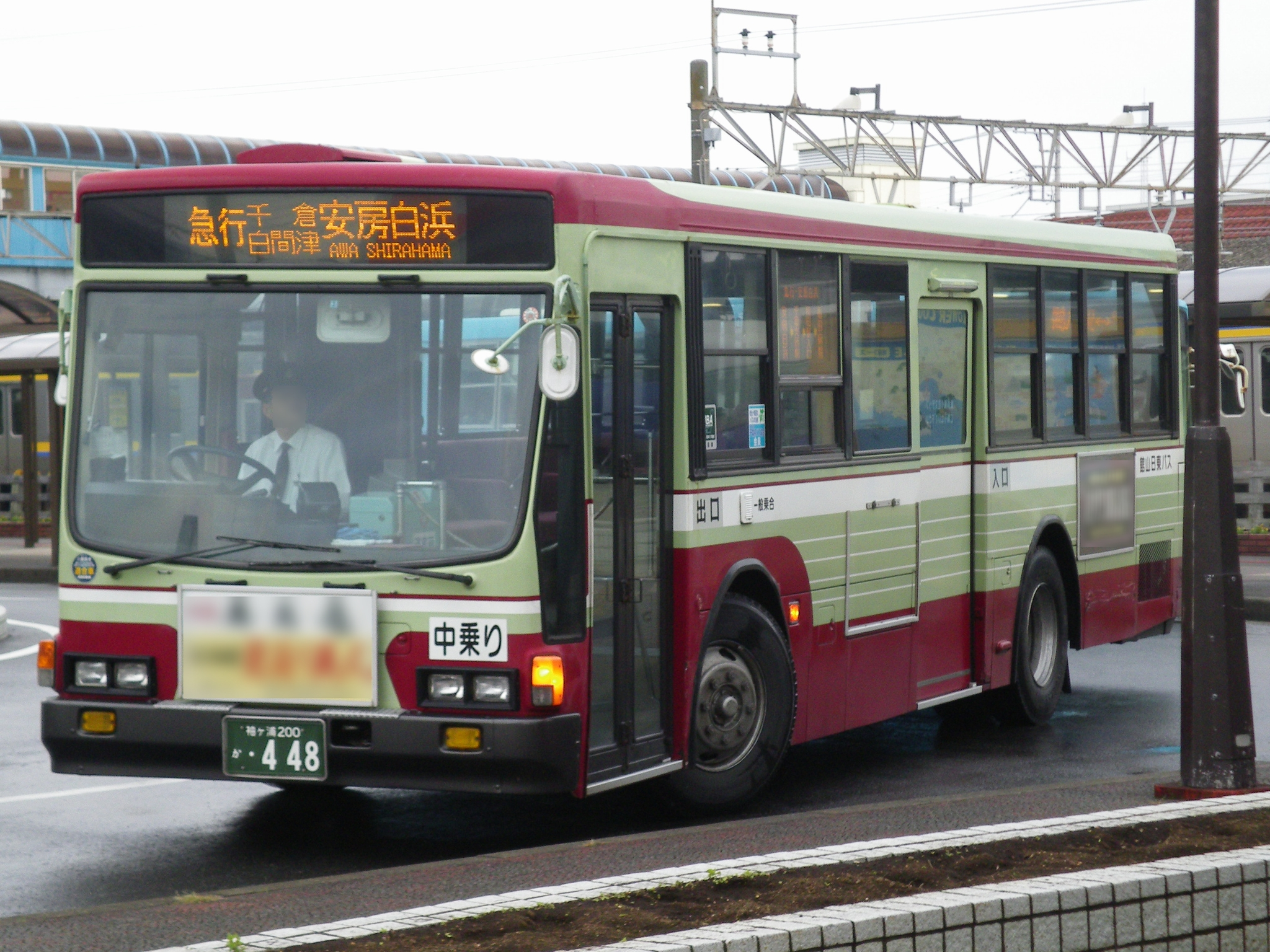 いすゞ・キュービック 袖ケ浦200か448 安房鴨川駅にて撮影